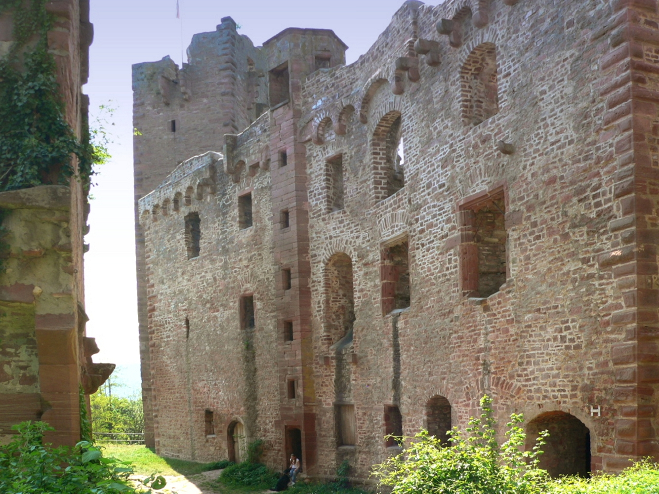 Henneburg oberhalb von Stadtprozelten am Main, Germany - westlicher Palas mit Treppenturm; kleiner Bergfried